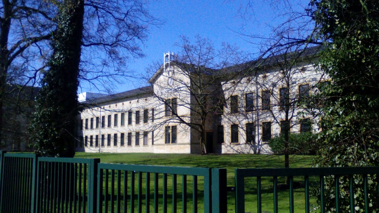 Gebäude der Spinnerei Vorwärts Bielefeld. Erbaut 1851.